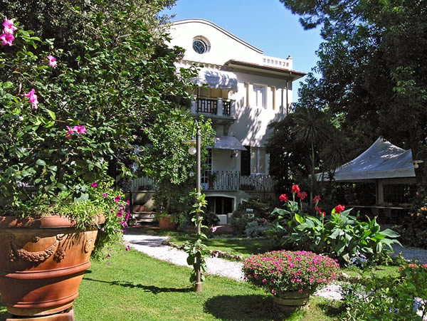 La Casa-museo di Galileo Chini. Oggi divenuto una Residenza d'Epoca